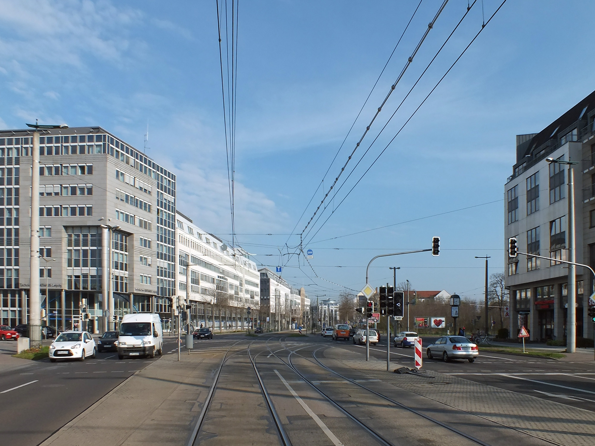 Leipzig-Thonberg, Prager Straße (Einmündung Riebeckstraße), links Technisches Rathaus, rechts Thonberg-Klinik